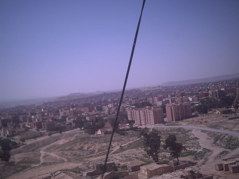 Photo de TAOURIRT